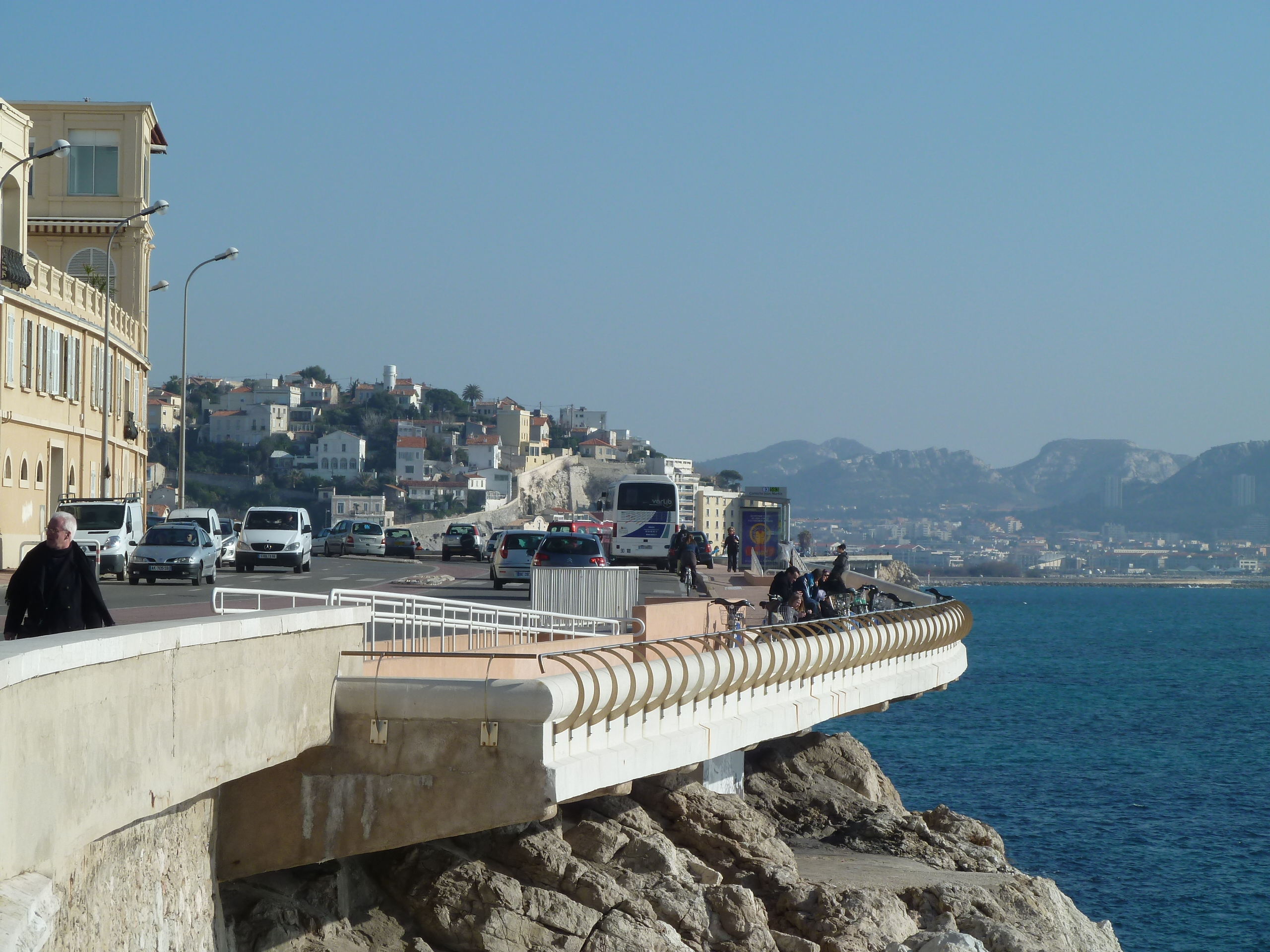 La Corniche du Président John Fitzgerald Kennedy dans sa traversée du quartier du Bompard au niveau du Parc Valmer à Marseille.